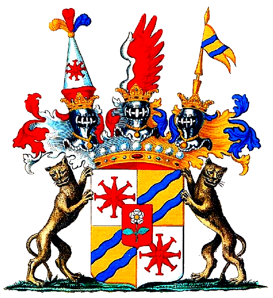 Wappen der Grafen Basselet von La Rosée, original altkolorierter Wappen-Kupferstich